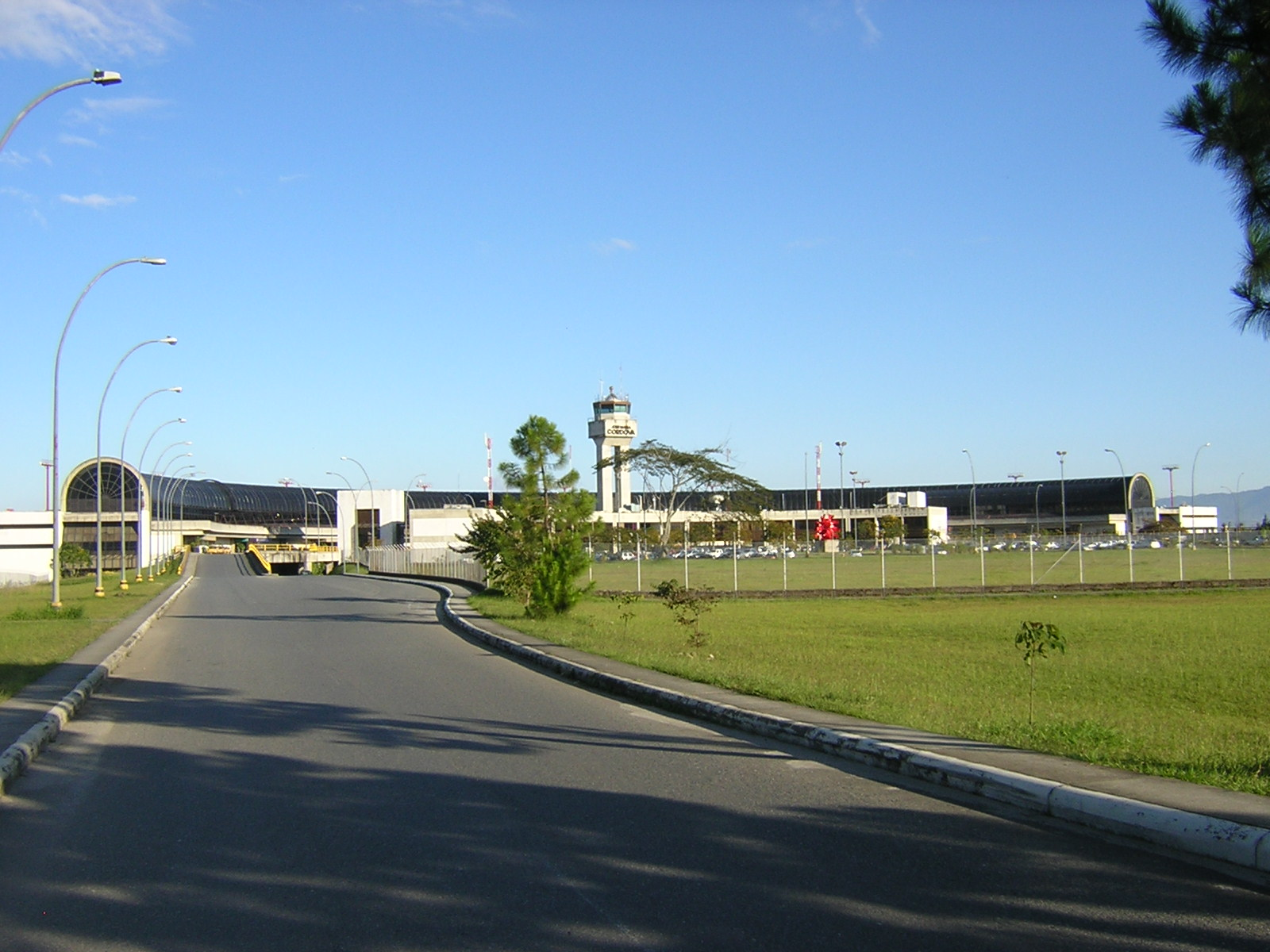 Exterior del Aeropuerto Internacional José María Córdova